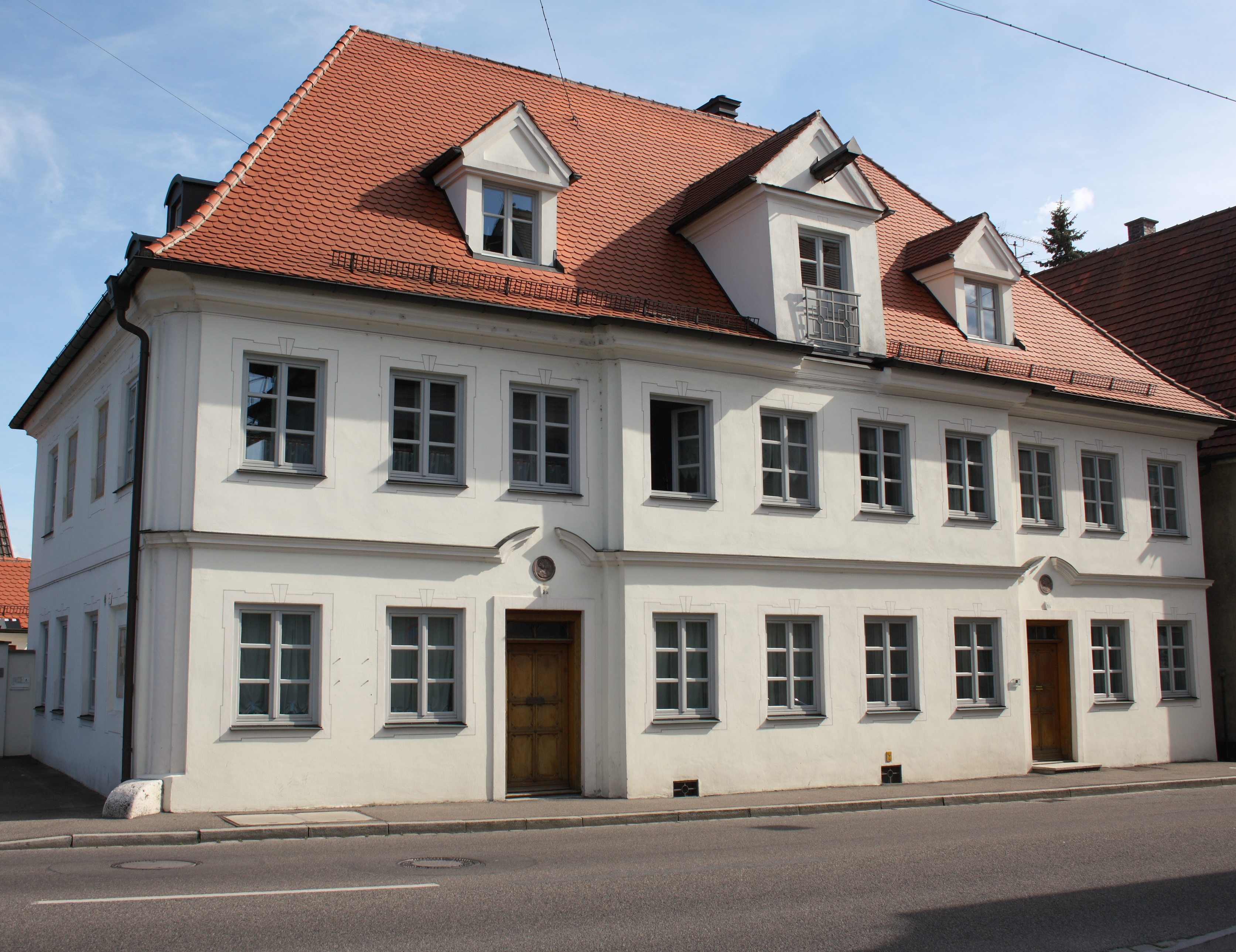 Ehemaliges Benefiziatenhaus in Lauingen im Landkreis Dillingen an der Donau (Bayern), Herzog-Georg-Straße 1a/1b